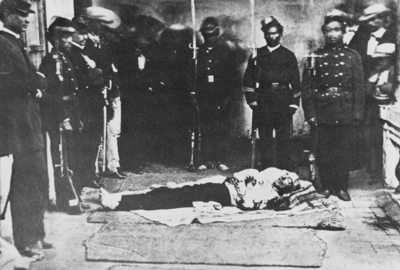 Der Leichnam des ecuadorianischen Präsidenten Gabriel García Moreno 1875